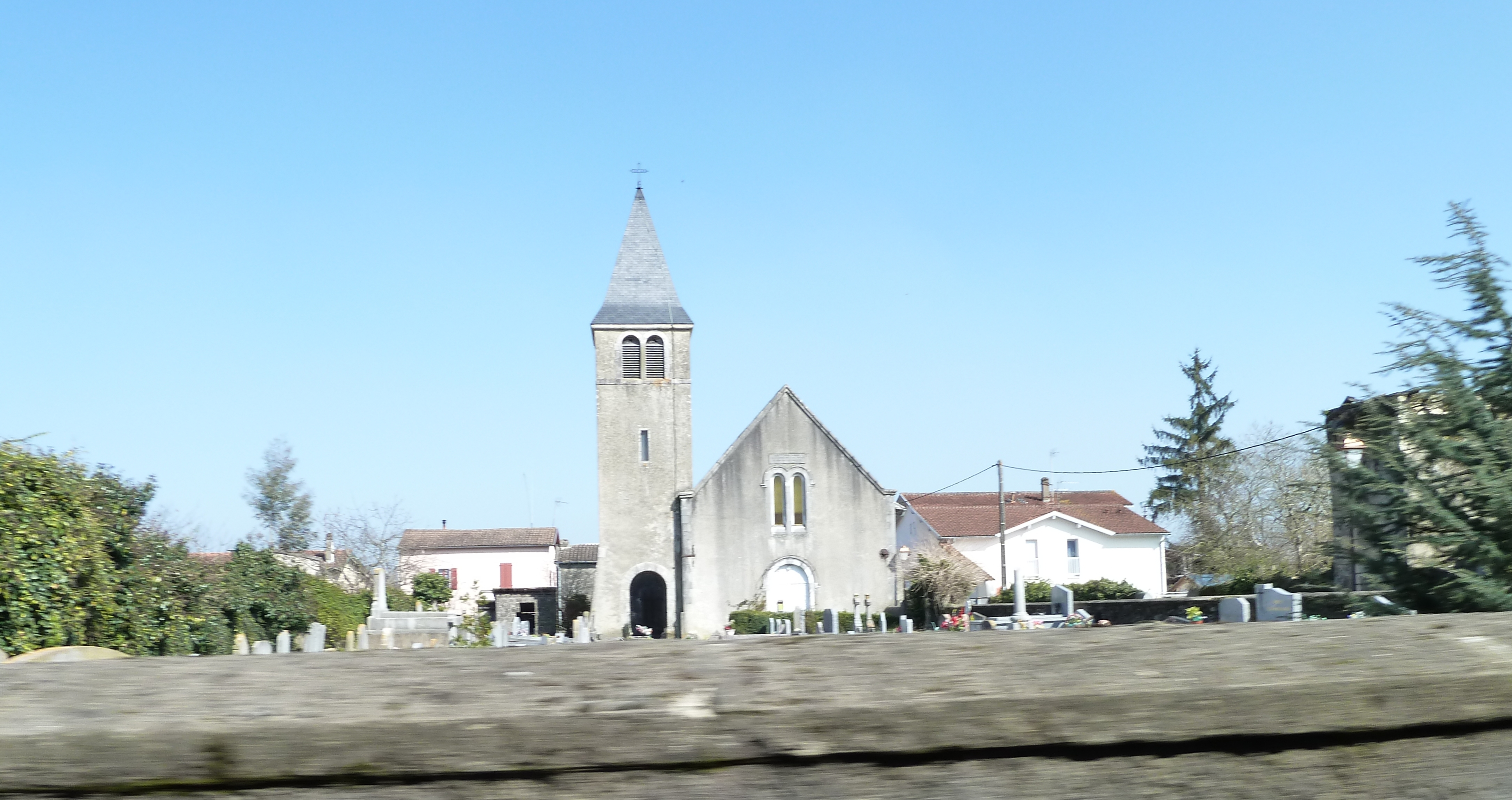 Temple protestant de Bellocq